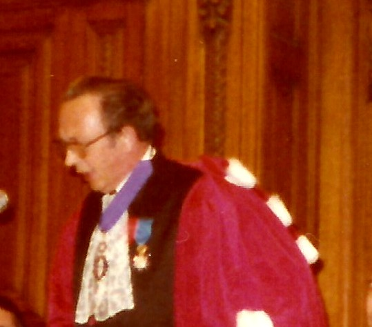 Le premier président de l'Université Paris VI dans le Grand Amphi de la Sorbonne lors de la remise des diplômes de docteur honoris causa